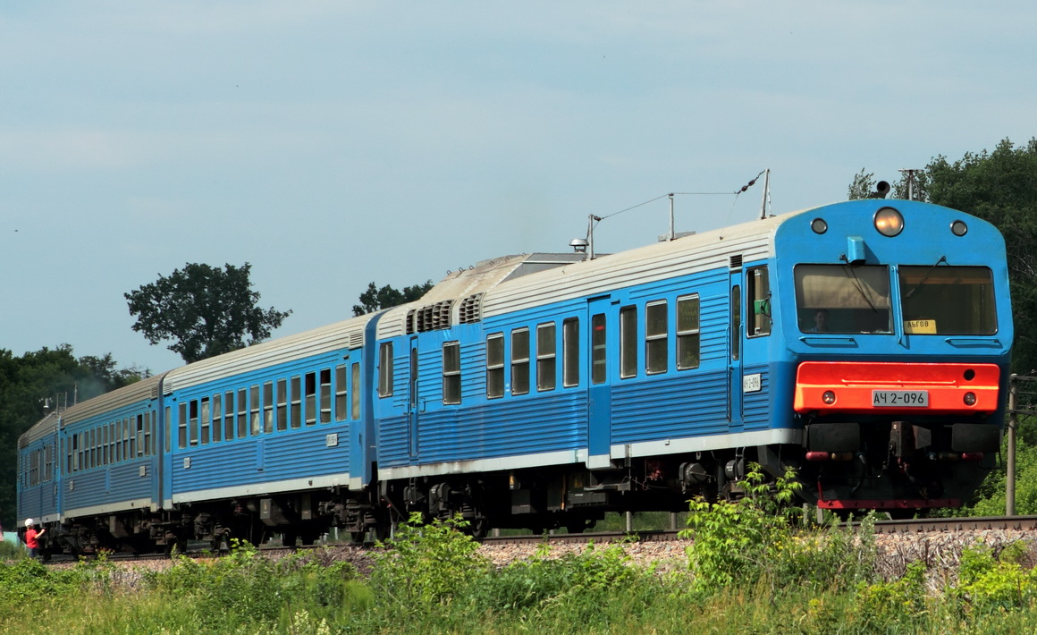 Дизель-поезд из автомотрисы АЧ2-096, 2-х вагонов АПЧ2 и автомотрисы АЧ2. Россия, Курская область, станция Дмитриев-Льговский.